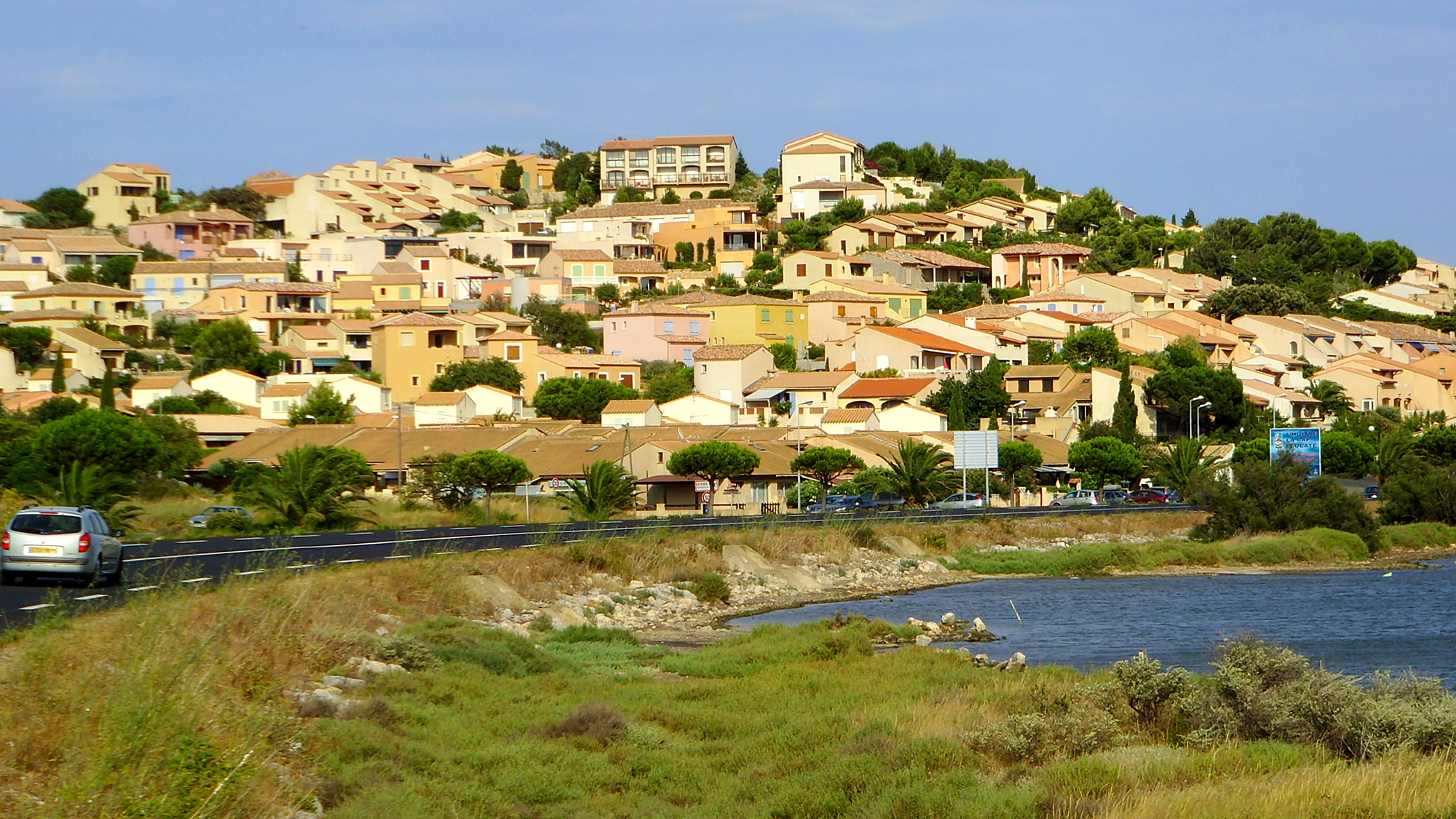 Leucate, Aude, France: Leucate Plage photographer: Gerbil, summer 2006